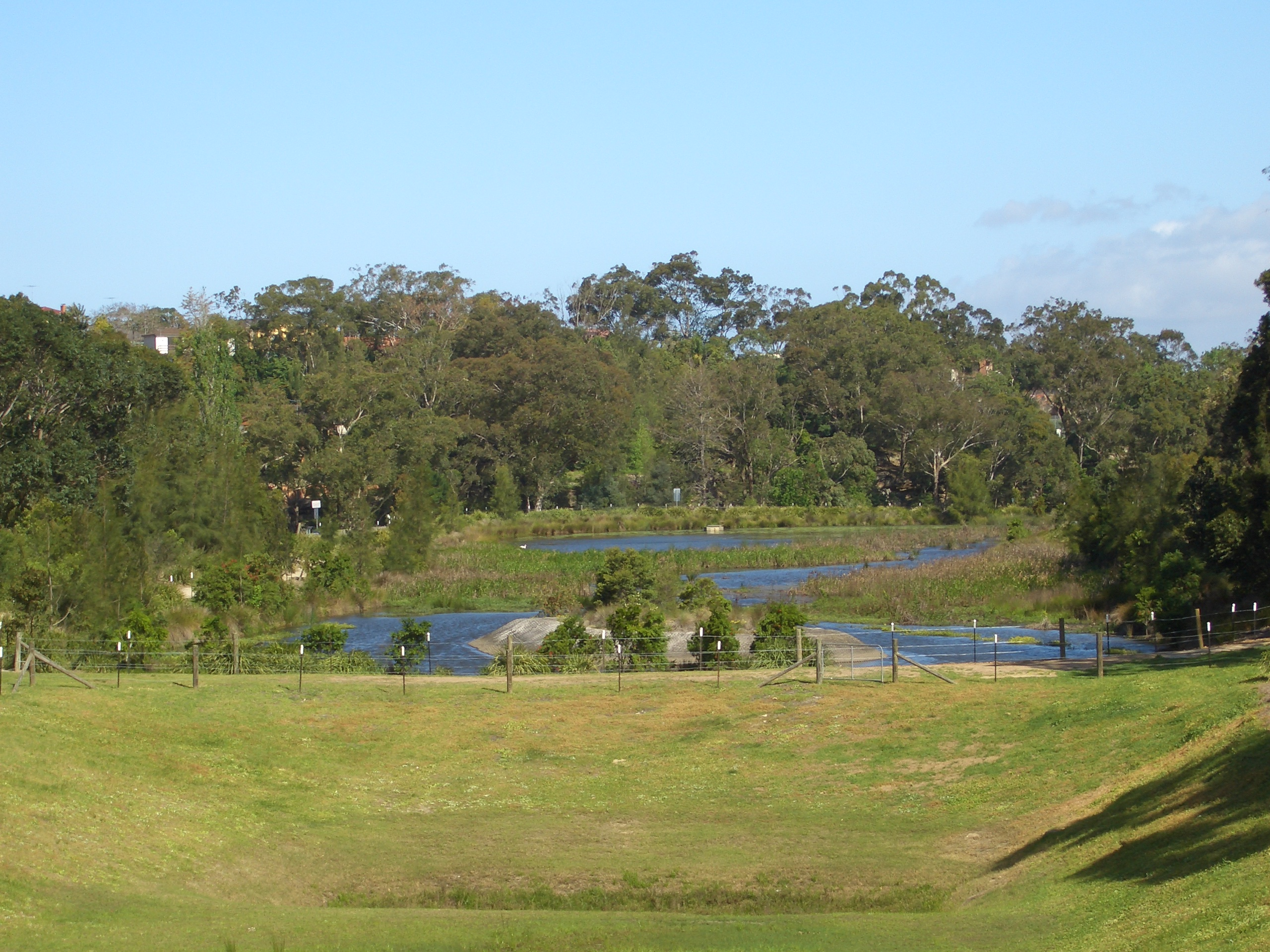 Hurstville Grove